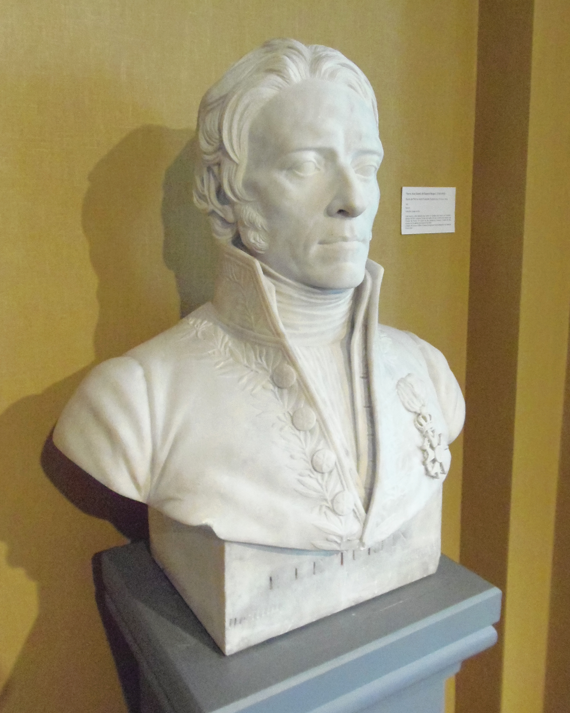 Vire (Normandie, France). Buste de Pierre Turpin par David d'Angers (1841, musée de Vire).